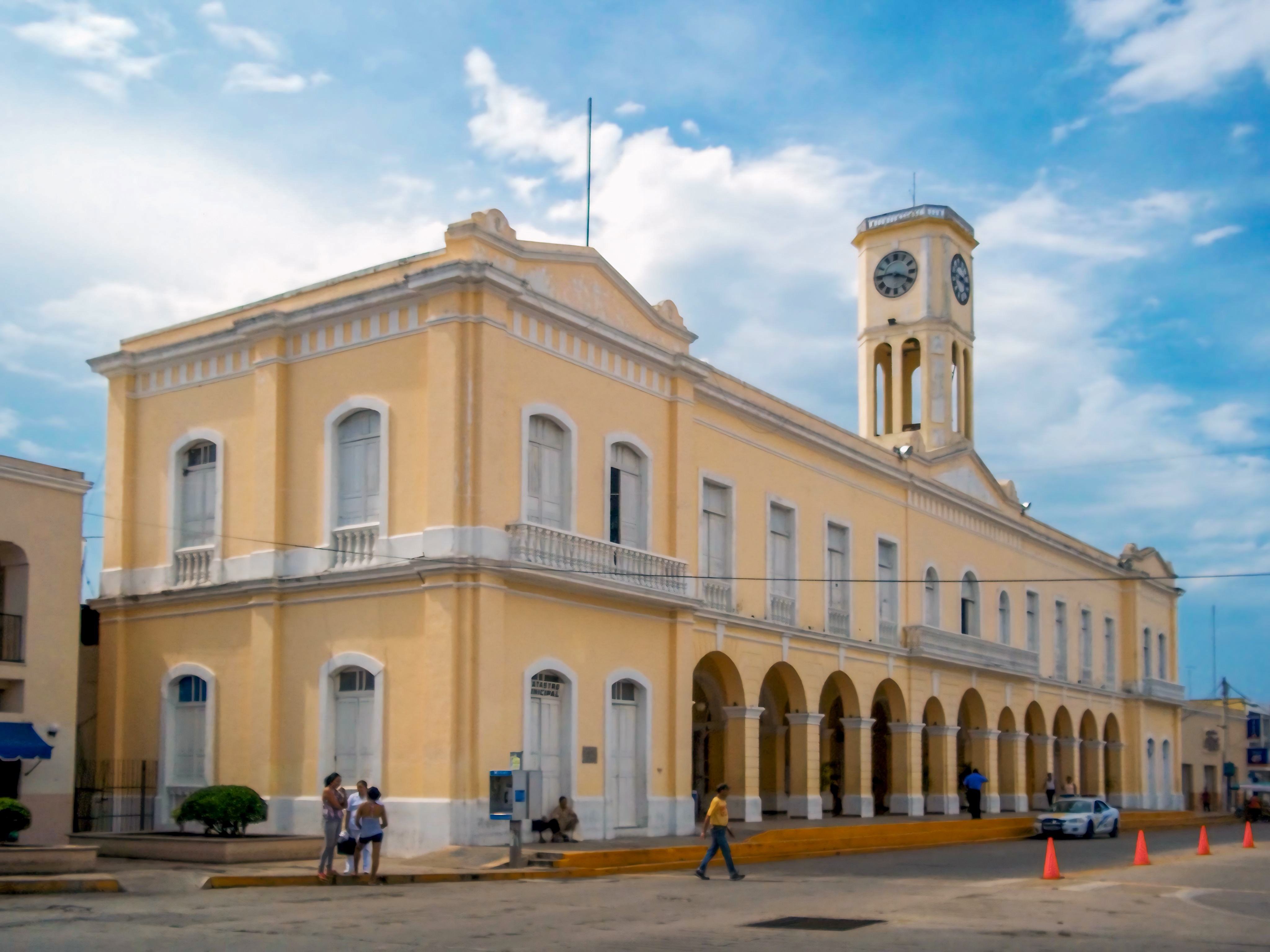 Palacio Municipal de Motul